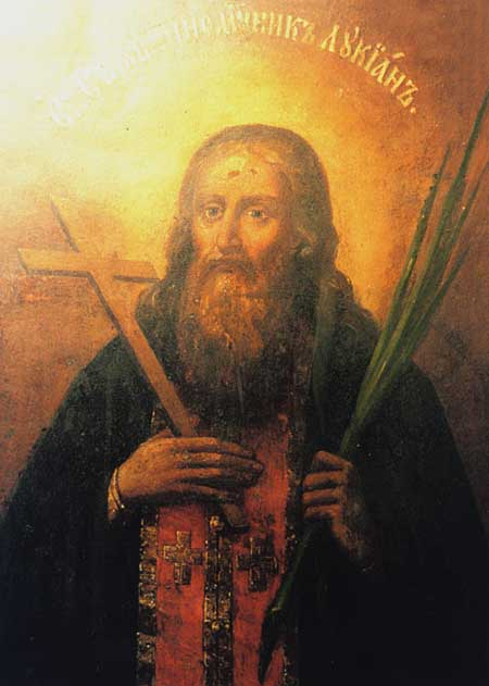 Saint Lucian the Martyr (d. 1243 during the mongol-tatar invasion of khan Batyi) Лукіян, священномученик - ? - бл. 1243 р. Ієромонах Печерського монастиря. Священномученик. Пам'ять 10 вересня і 28 жовтня. Епітафія на аркосольній іконі його святого зовсім коротка. Вона повідомляє, що: "Лукіян священномученик постраждав від Батия близько 1243 року". Його мощі спочивають у Дальніх печерах.